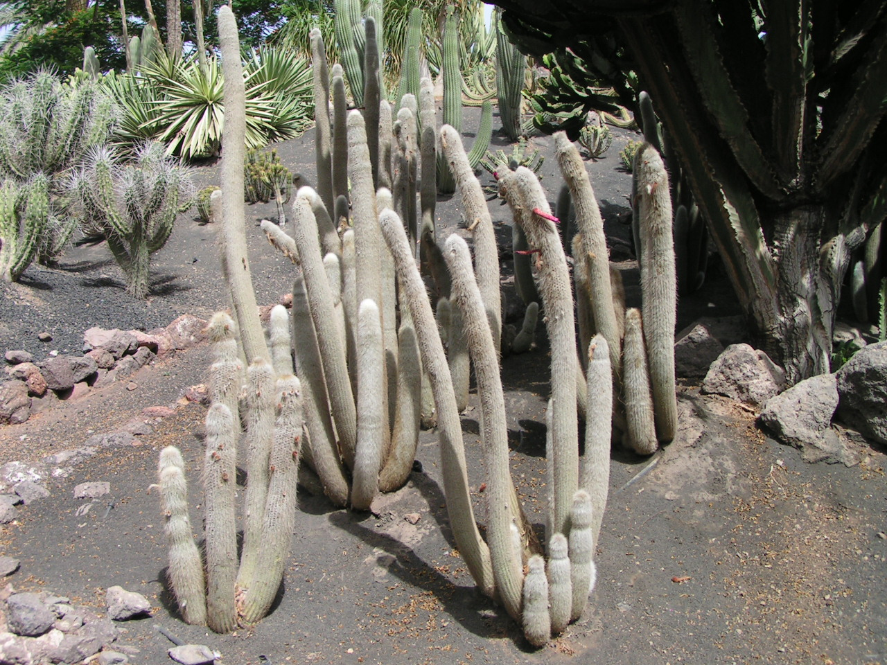 Cleistocactus strausii at the Oasis zoopark, La Lajita, Fuerteventura, Spain